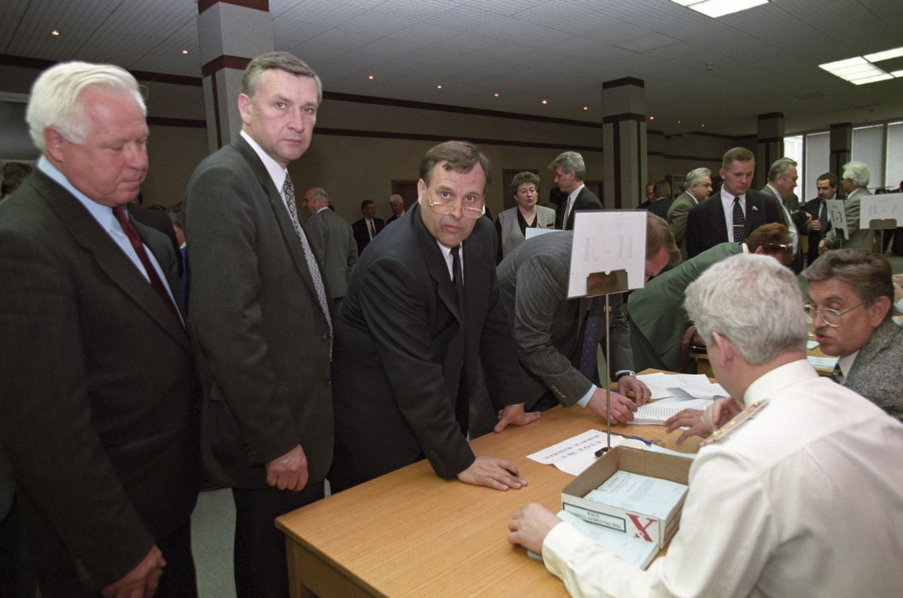 Депутаты Государственной Думы во время рассмотрения на пленарном заседании вопроса об импичменте Президенту России Б.Н.Ельцину. 15 мая 1999г. фото А.Н.Лукашина